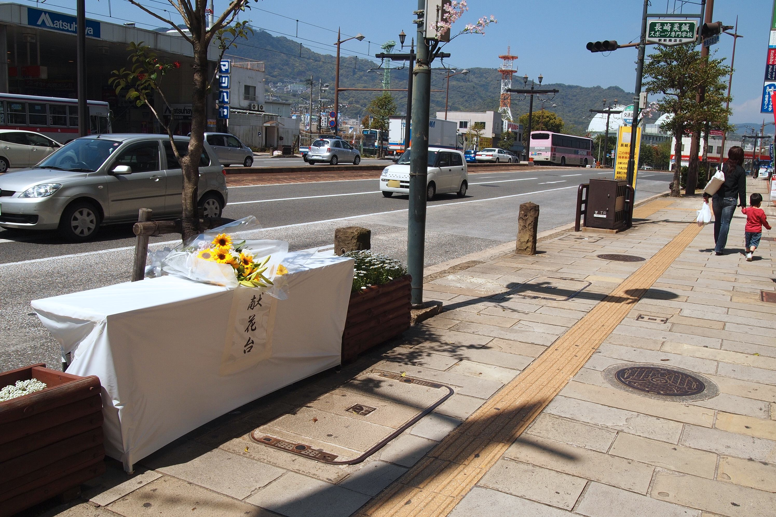 2007年4月17日に長崎市長（当時）の伊藤一長が銃撃された現場。撮影時は襲撃事件から5周年で、現場に献花台が設けられている。